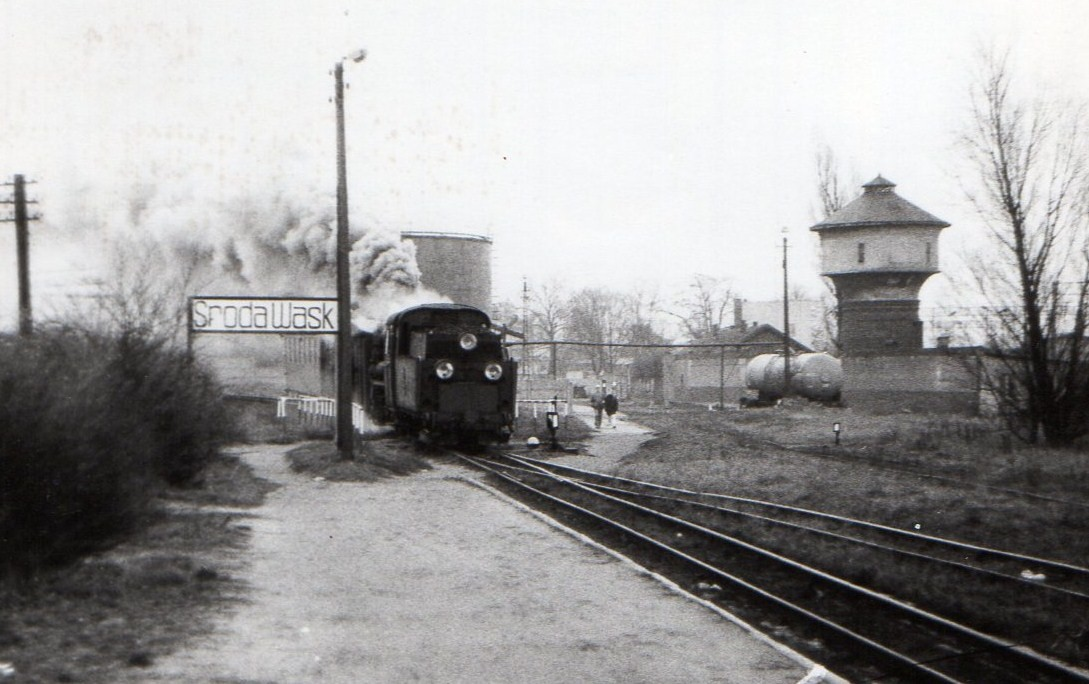 Parowóz wąskotorowy Px48-1920 na stacji kolejowej Środa Wielkopolska Wąskotorowa.